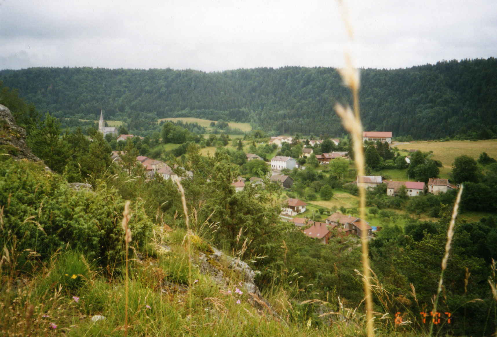 C'est Choux